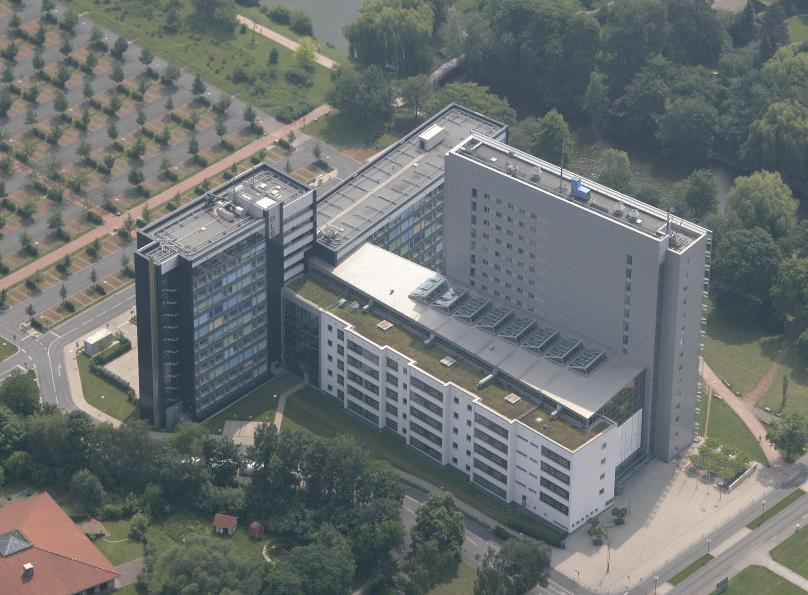 Luftbildaufnahme Hamm